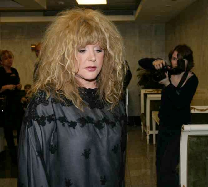 Алла Пугачева